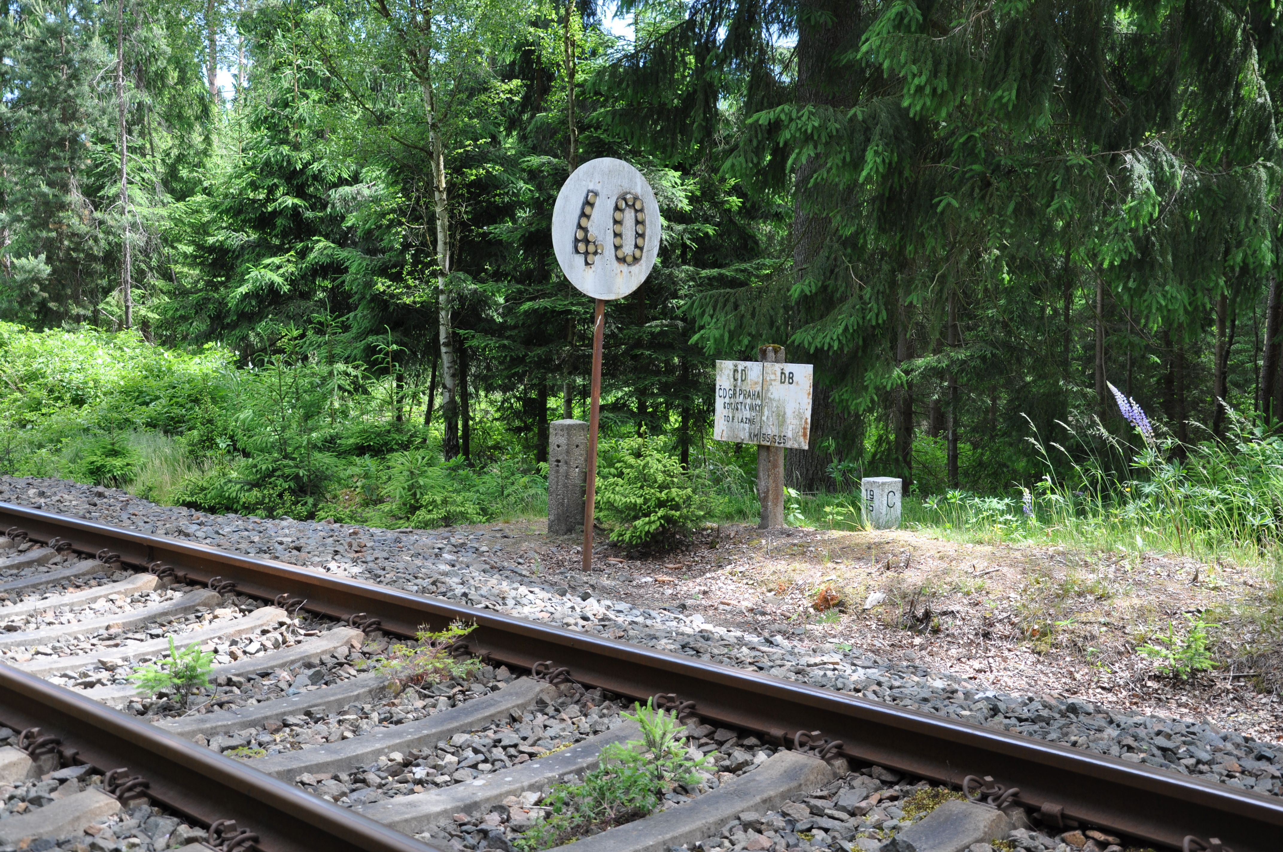 Infrastrukturgrenze zwischen SŽDC und DB Netz am Bahnkilometer 55,525 der Bahnstrecke Plauen–Cheb